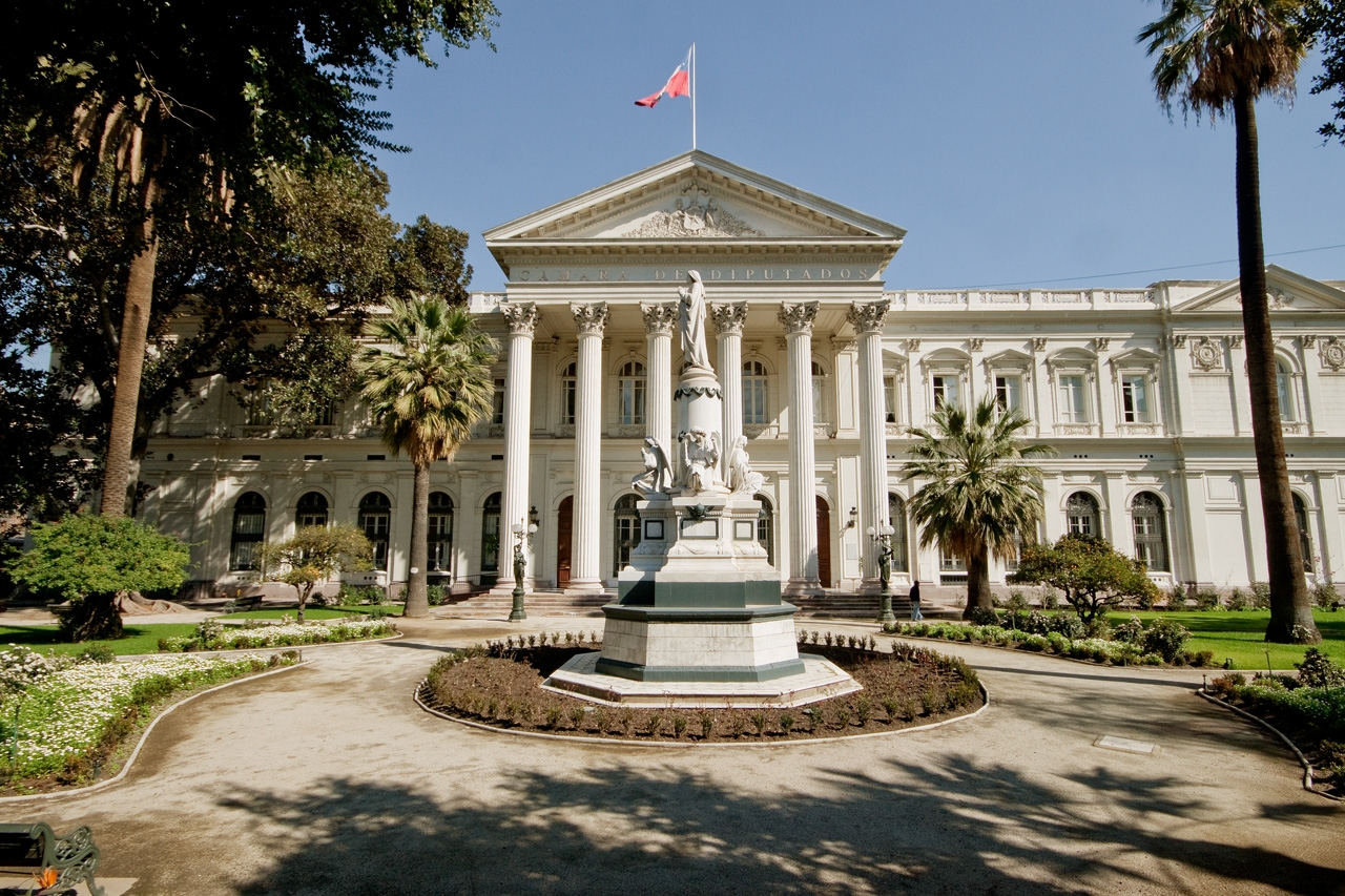 Santiago de Chile, Cámara de Diputados en el antiguo Congreso Nacional.